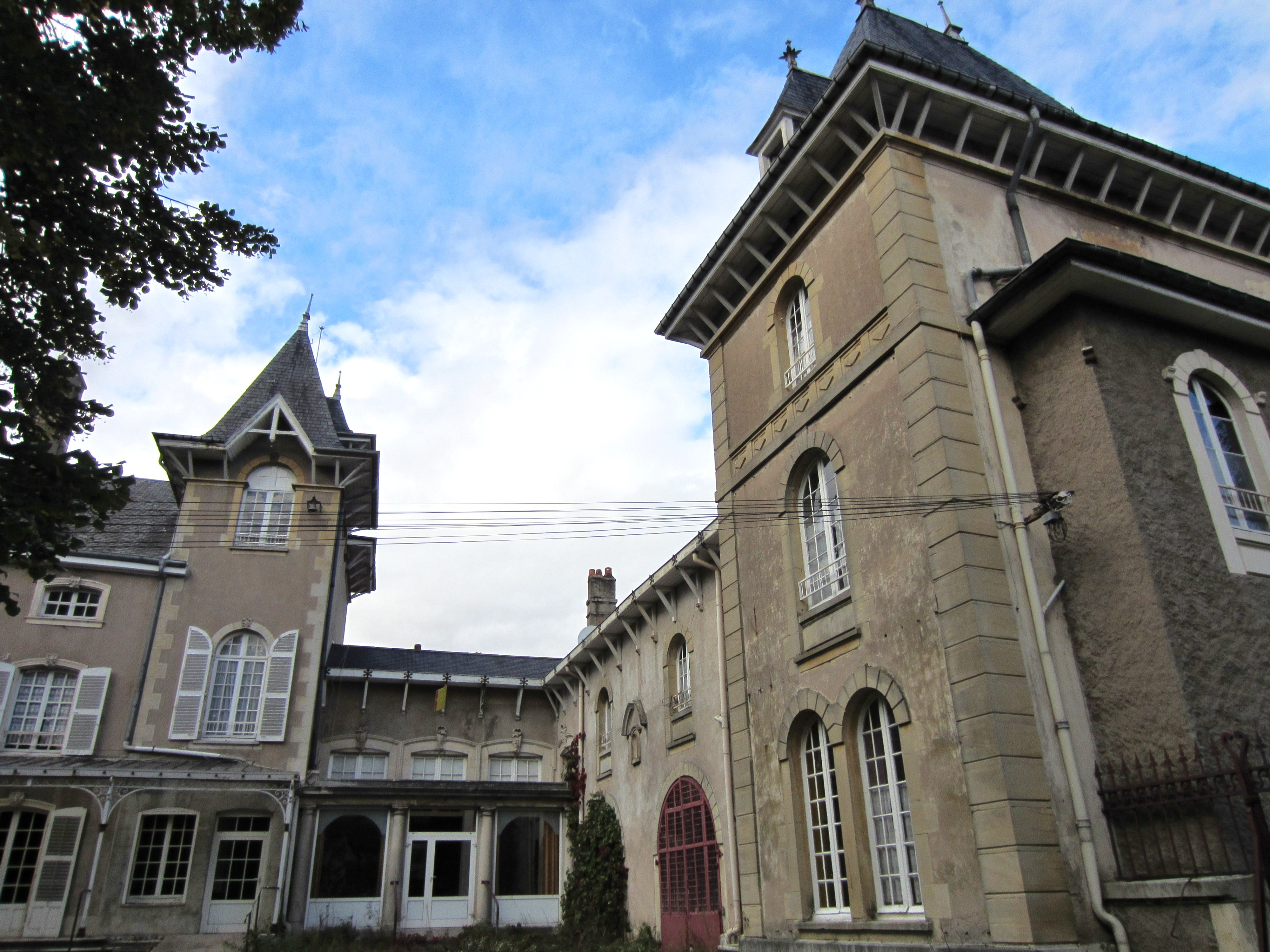 Description chateau Onville chateau Onville